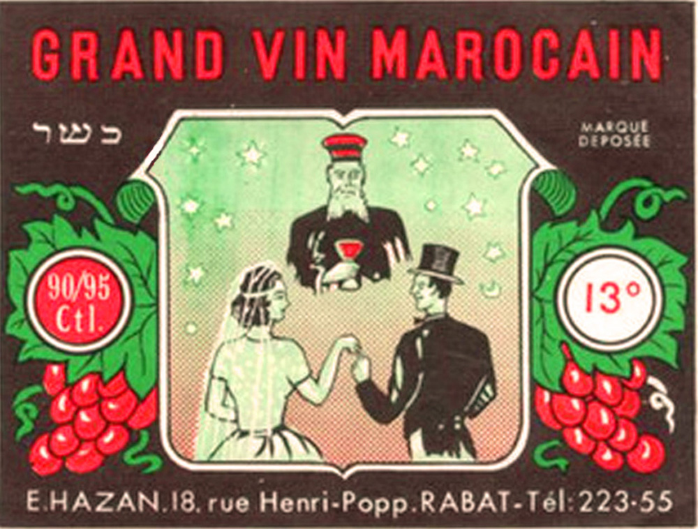 Hazan vin casher du Maroc